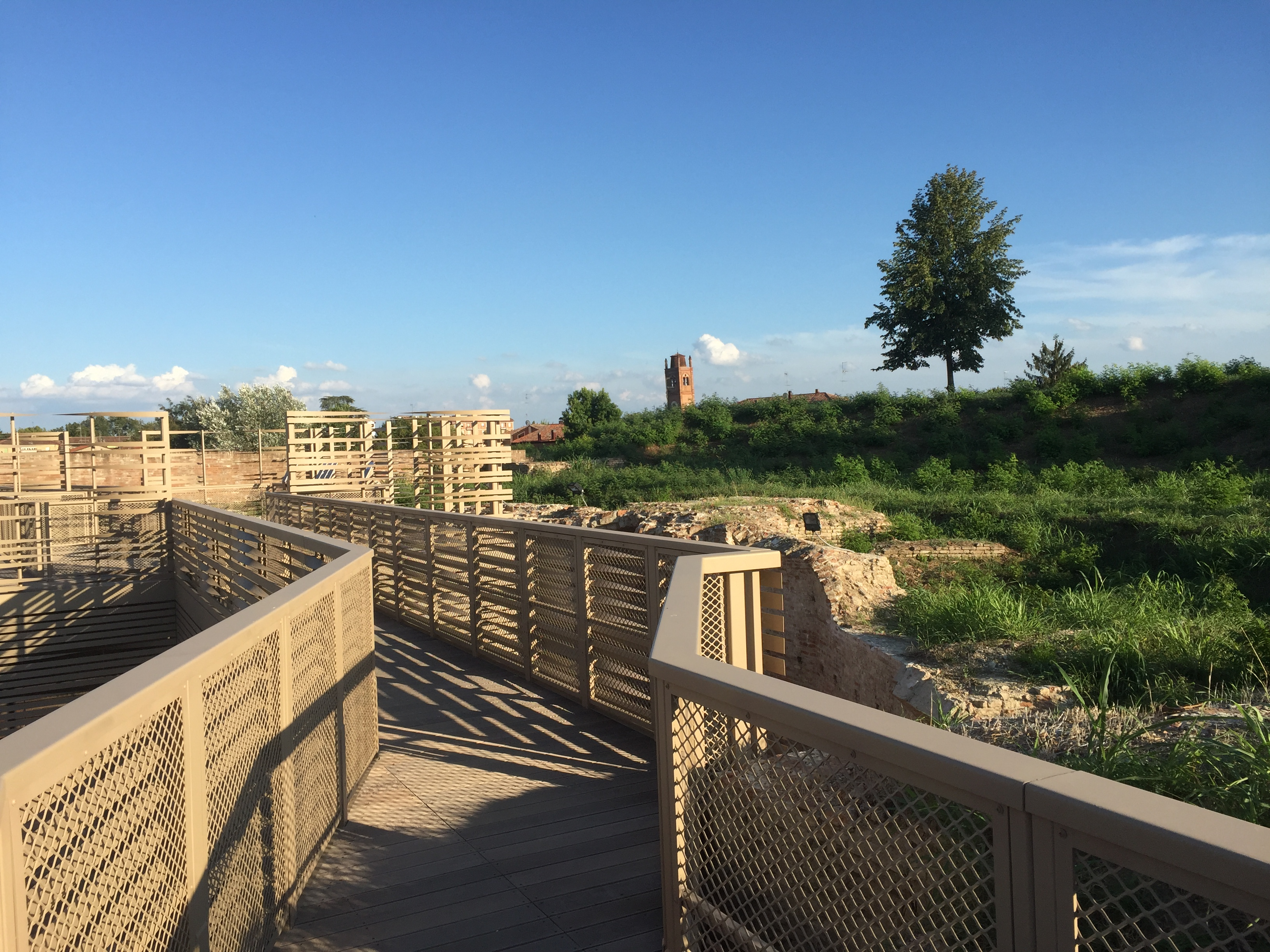 Baluardo dell'Amore, mura di Ferrara